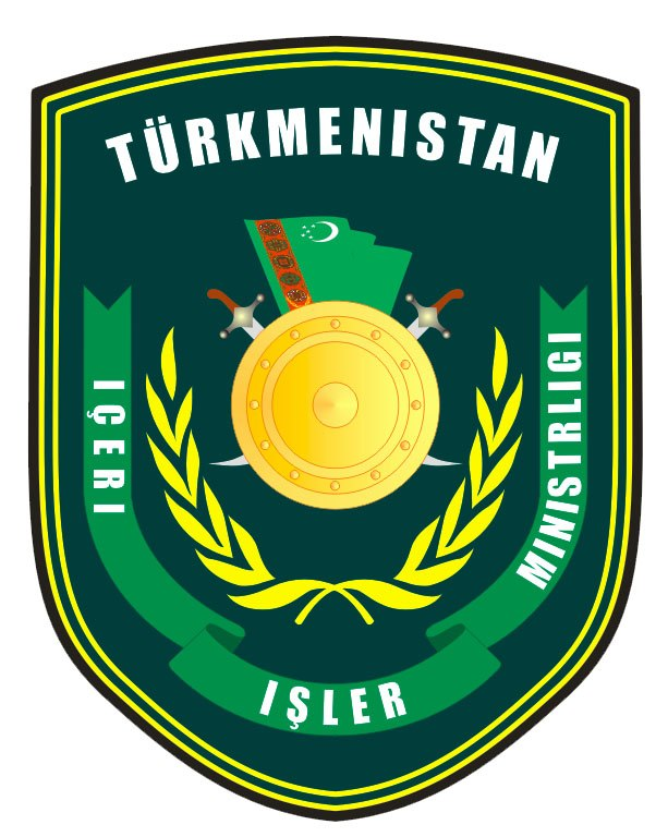 Министерство внутренних дел Туркмении